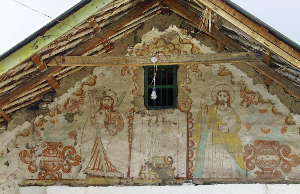 Iglesia de San Andrés Apóstol de Pachama This is a photo of a national monument in Chile: 2227